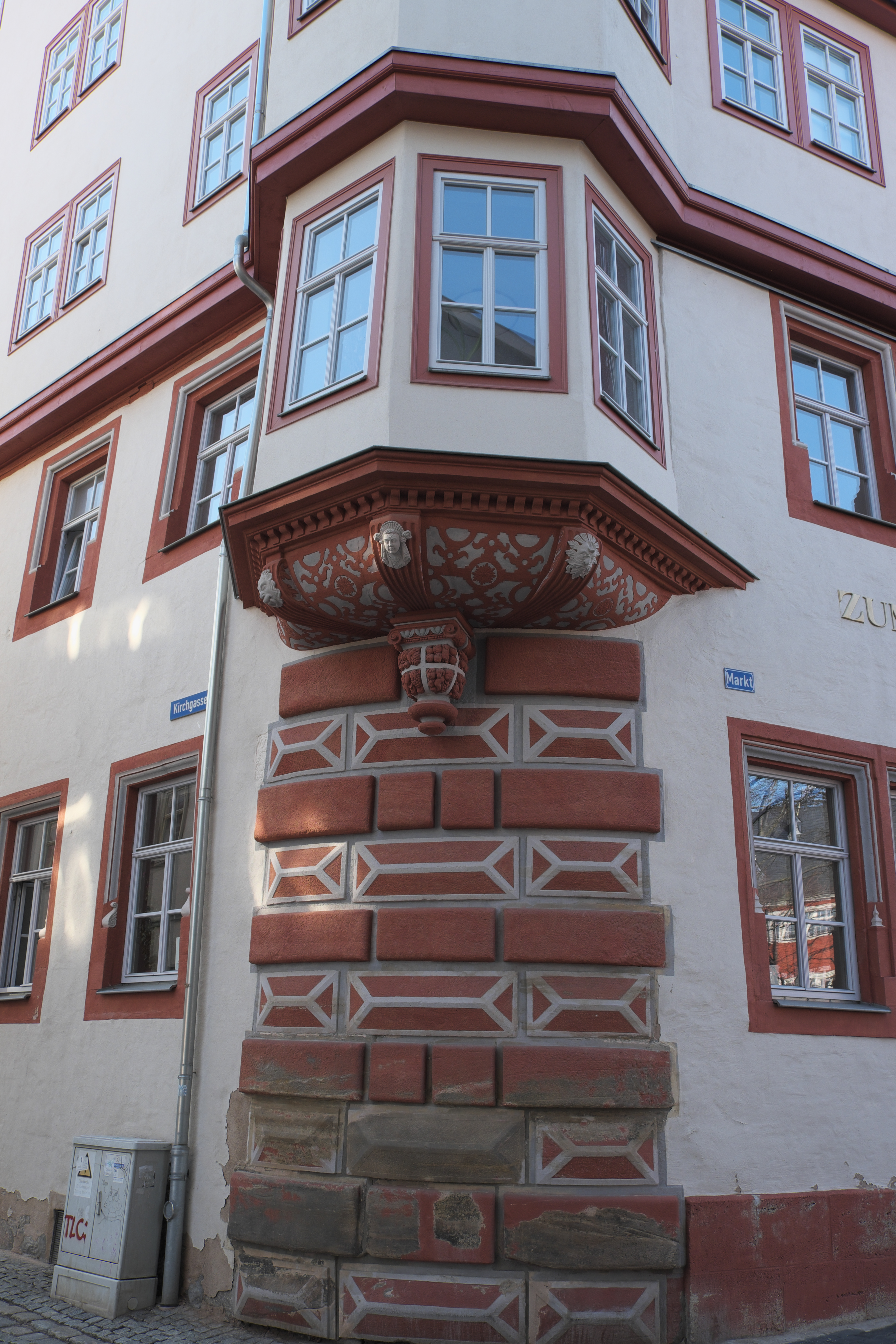 Haus Güldener Greif am Markt 11 in Arnstadt (Thüringen/Deutschland), Erker